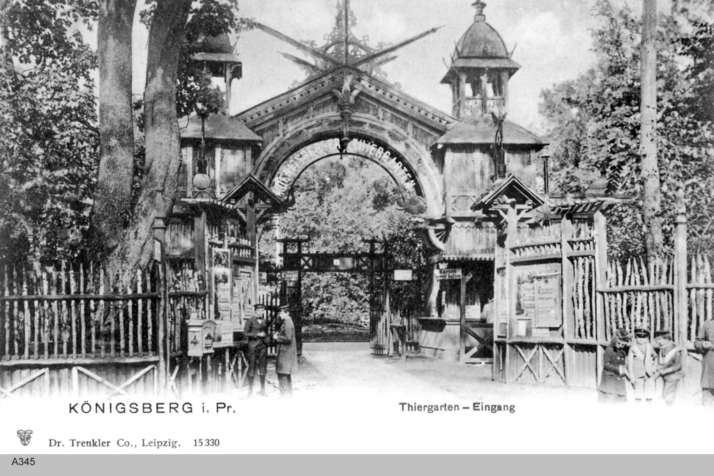 Eingang des Tiergartens in Königsberg